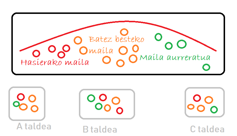 Ikasketa kooperatiboan talde heterogeneoak antolatzeko kontsigna egoten da.